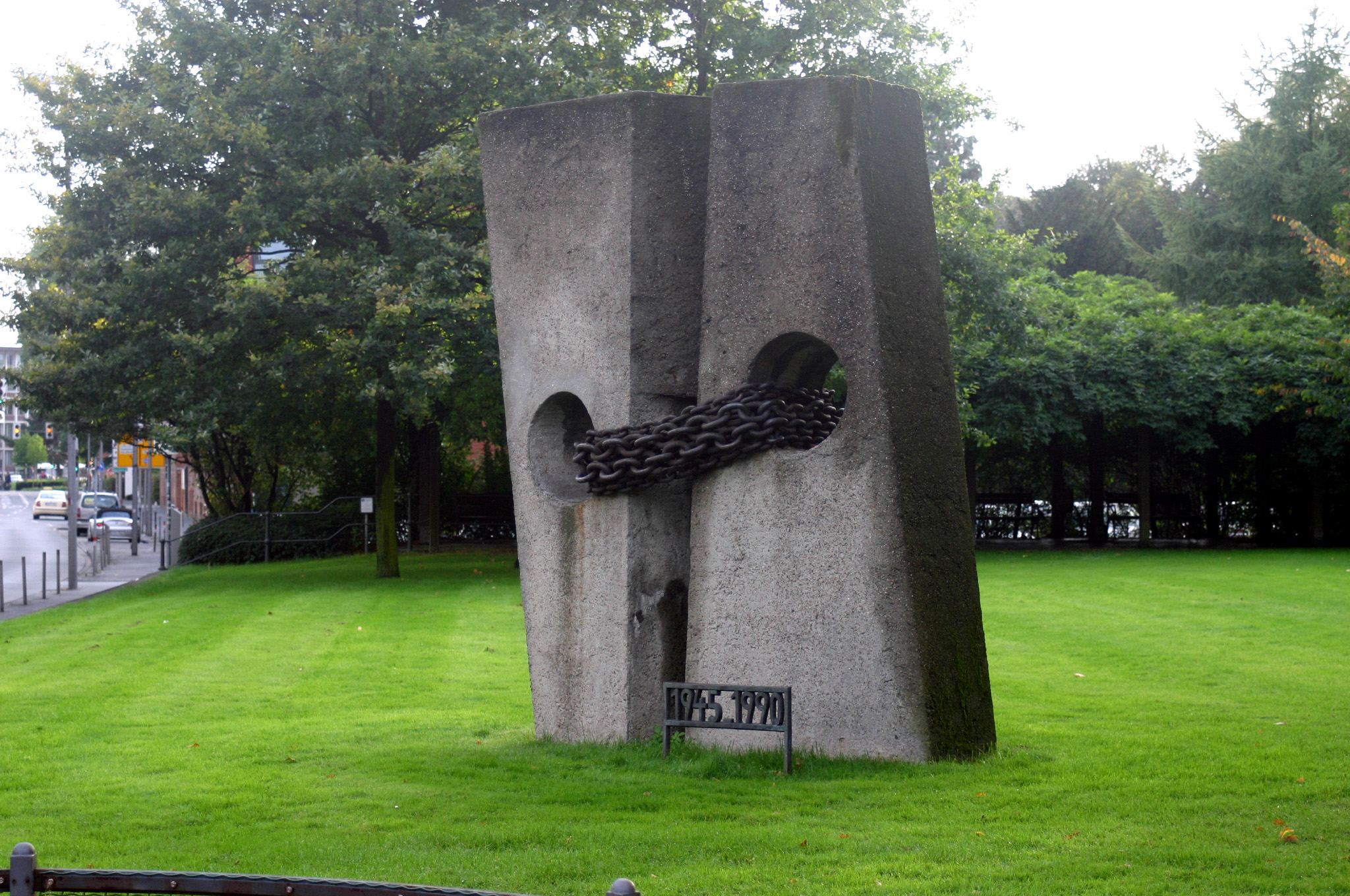 Münster, Germany, Servatiiplatz, Denkmal zur Deutschen Einheit